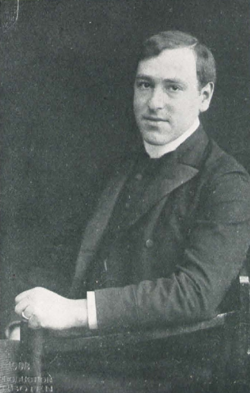 Rudolf Bernauer (1880-1953), deutsch-österreichischer Chanson-Autor, Operetten-Librettist, Theaterdirektor, Filmregisseur und Drehbuchautor.